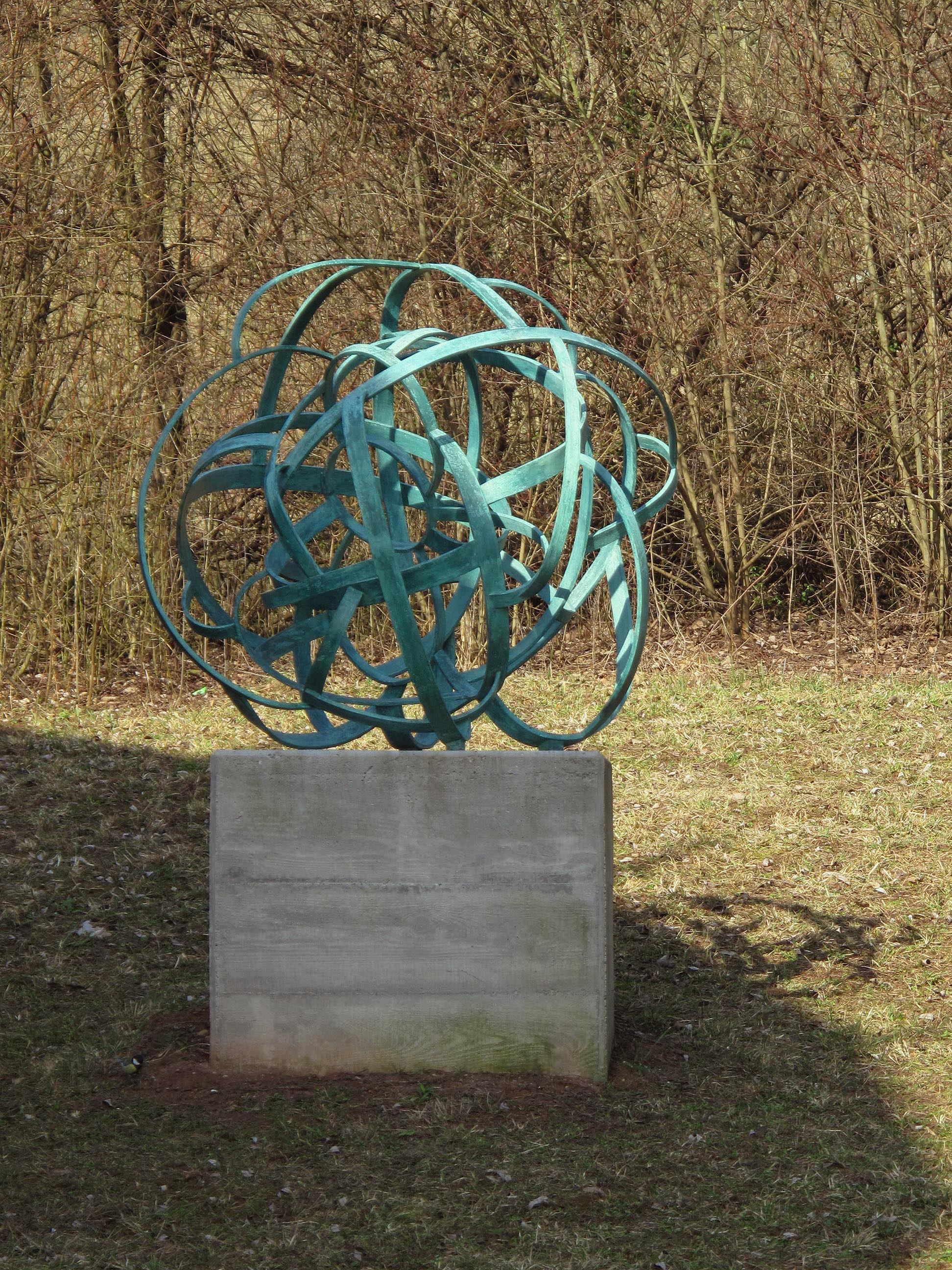 Jo Schöpfer, Komposition Markttag, 2000, Tübingen, Elfriede-Aulhorn-Straße 6, Anatomisches Institut